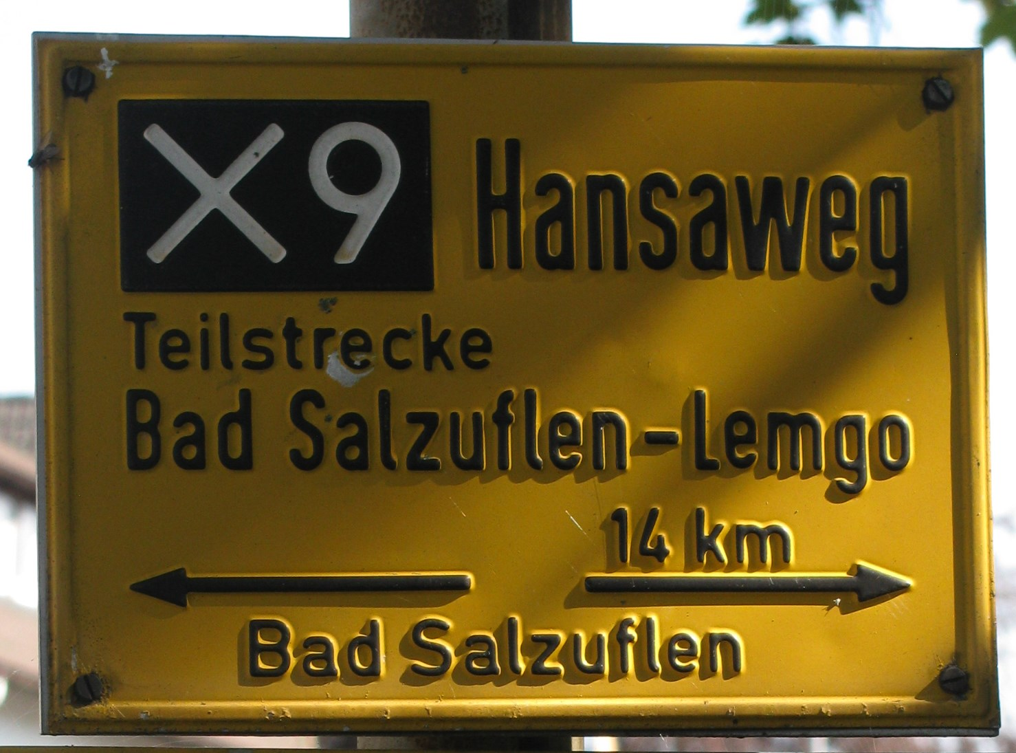 Deutschland - Nordrhein-Westfalen - Kreis Lippe - Bad Salzuflen: Wegweiser Hansaweg an der Ecke 'Wald-/Wenkenstraße'